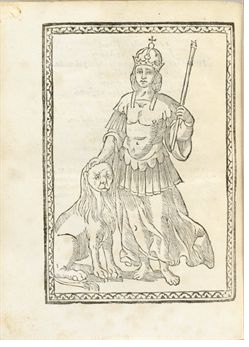 copertina del libro di Francesco Antonio Scacciavento